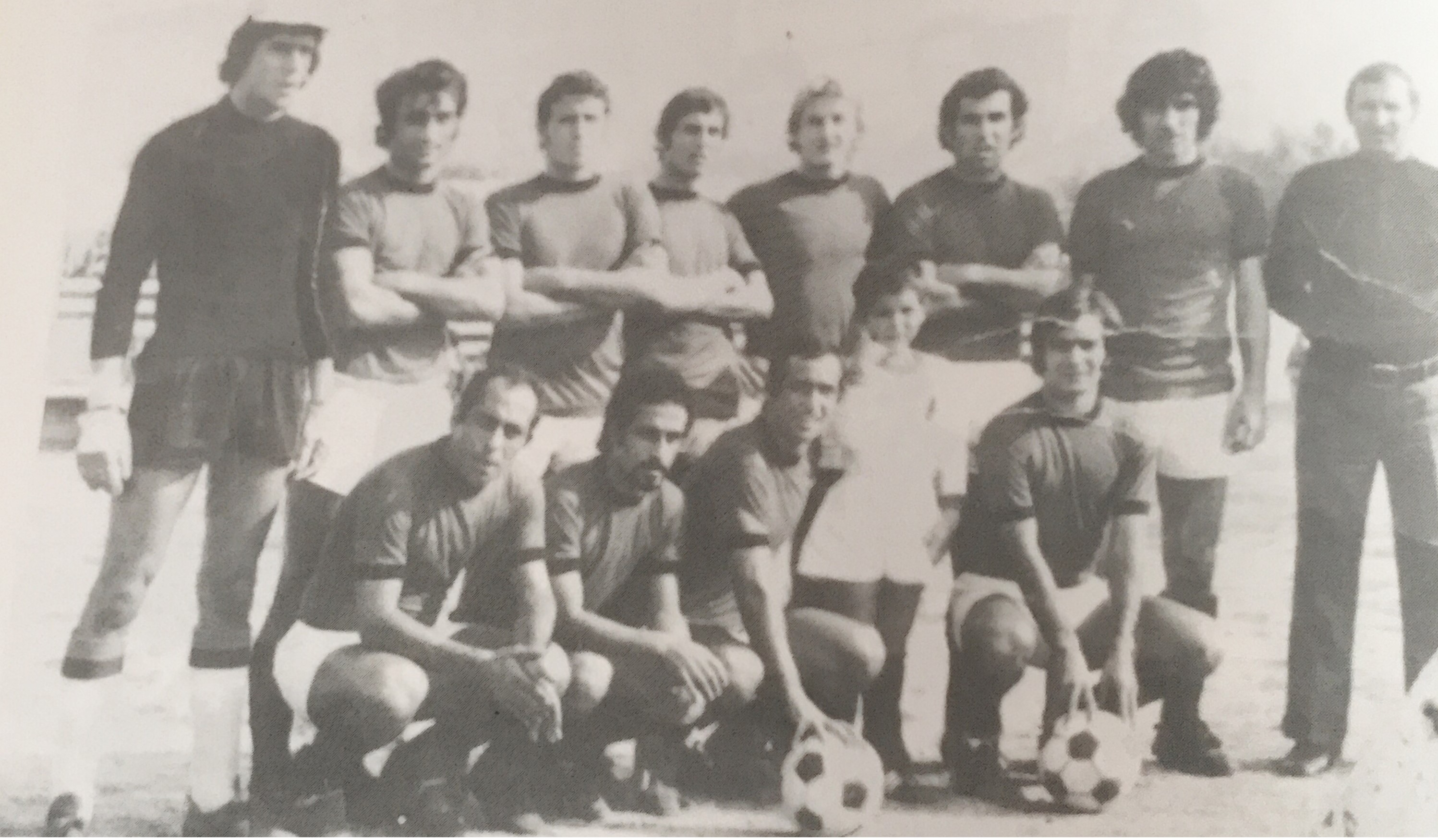 Da sinistra Nilo,De Vito,Marzocca,La Grotteria,D'Ascola,Maviglia,Cosentino,Costa(allenatore); in basso Gatto,Marino,Cittadino